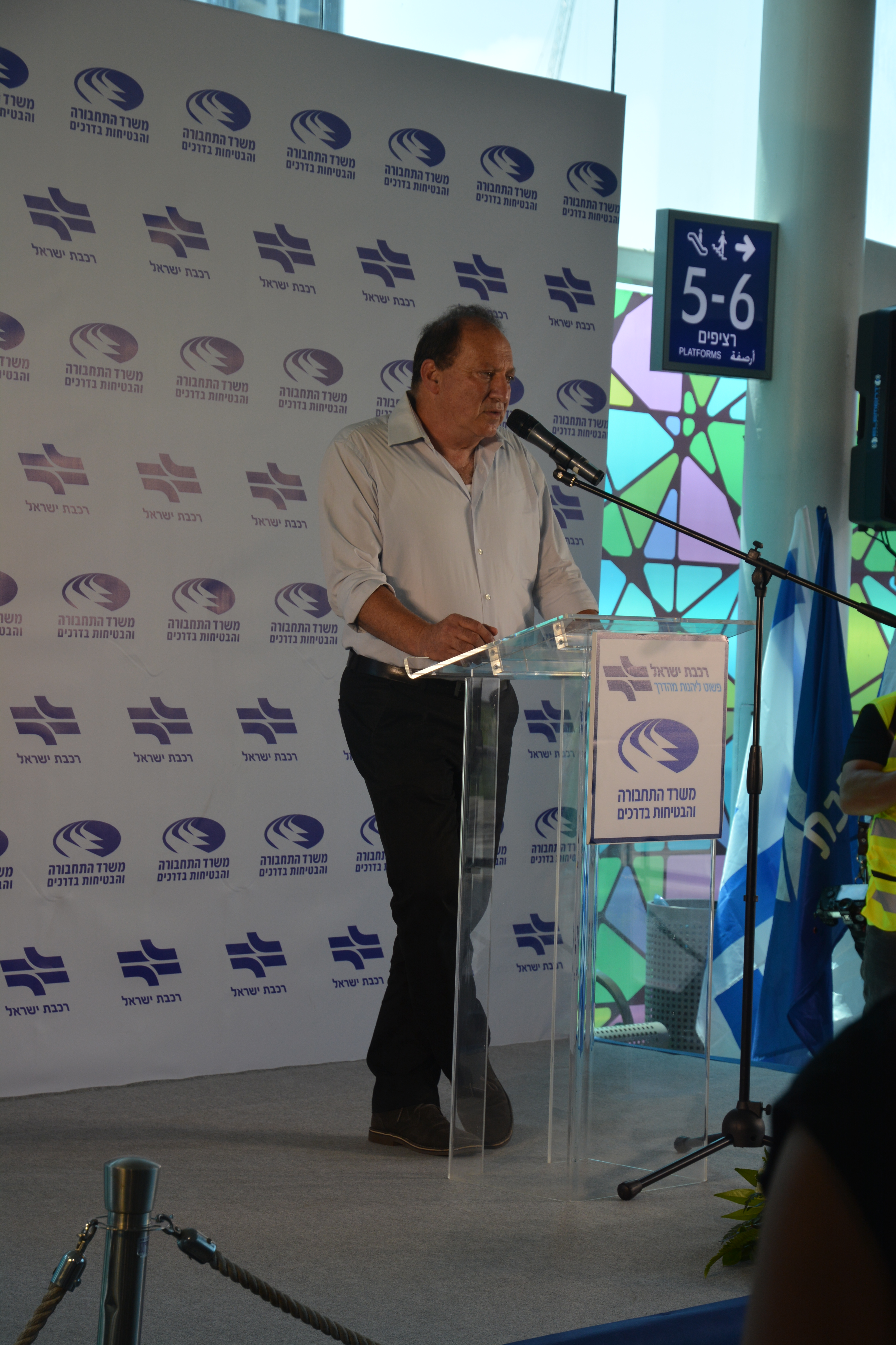 מנכ"ל רכבת ישראל באירוע הגעת קו הרכבת החשמלי מירושלים לתחנת הרכבת תל אביב מרכז סבידור